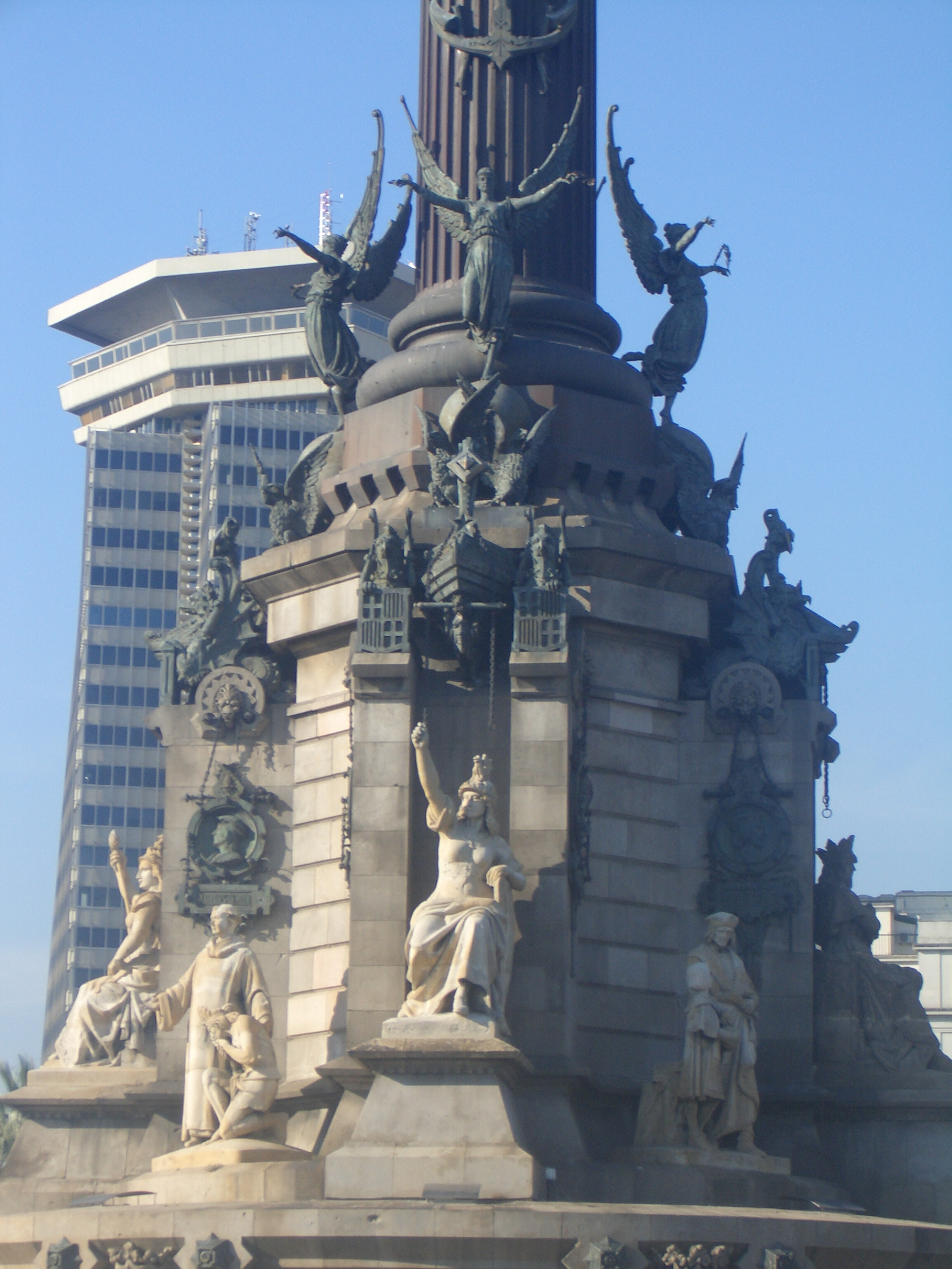 Detalle del Monumento a Colón, Barcelona,España.